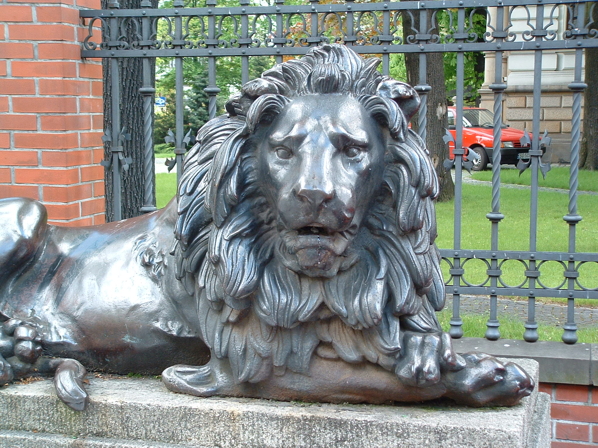 Lew przed gliwickim muzeum, Theodor Kalide, pracownia Ch. D. Raucha